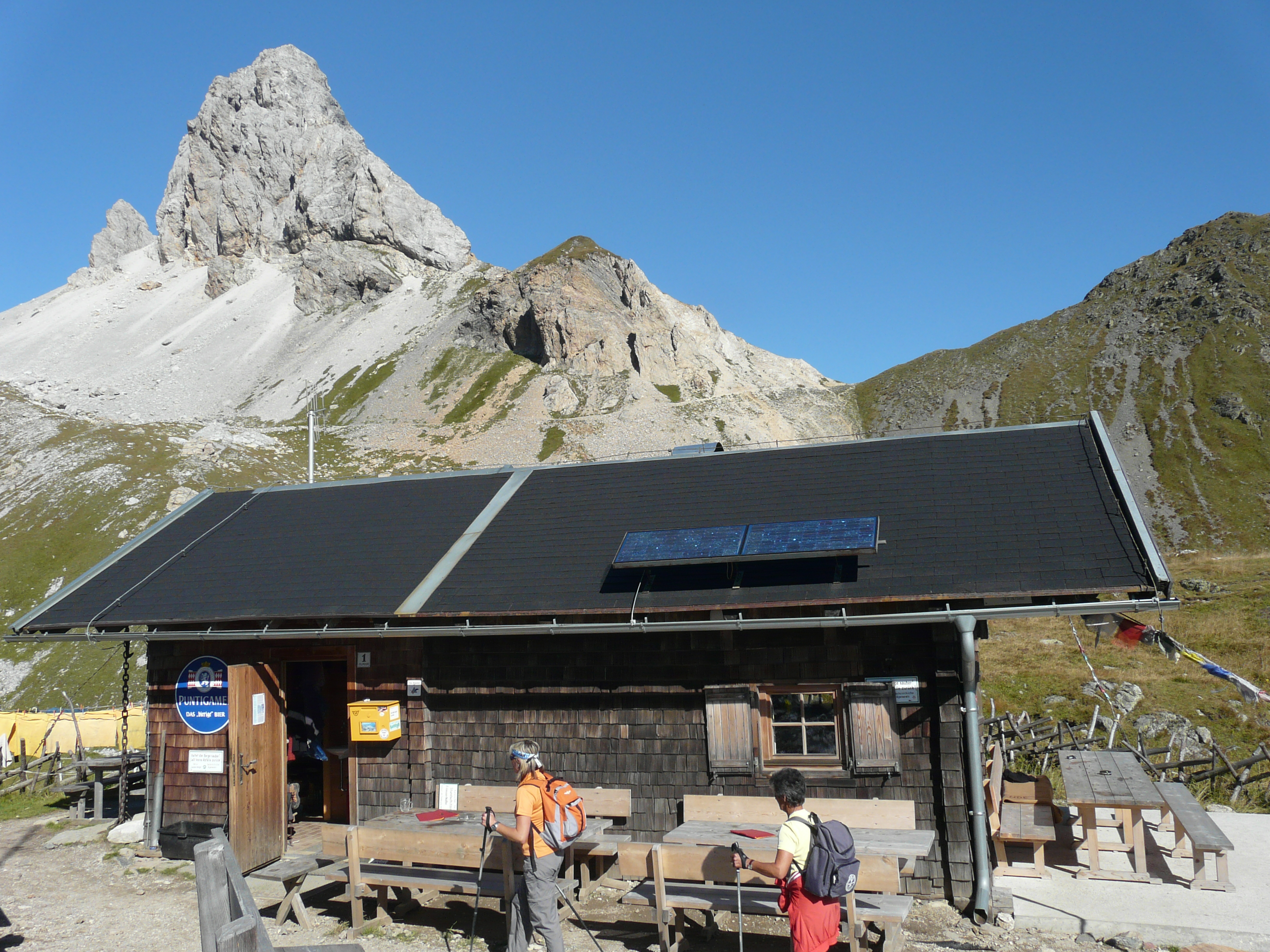 Die Filmoor-Standschützenhütte in den Karnischen Alpen. Dahinter die Große Kinigat.